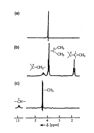 Geli